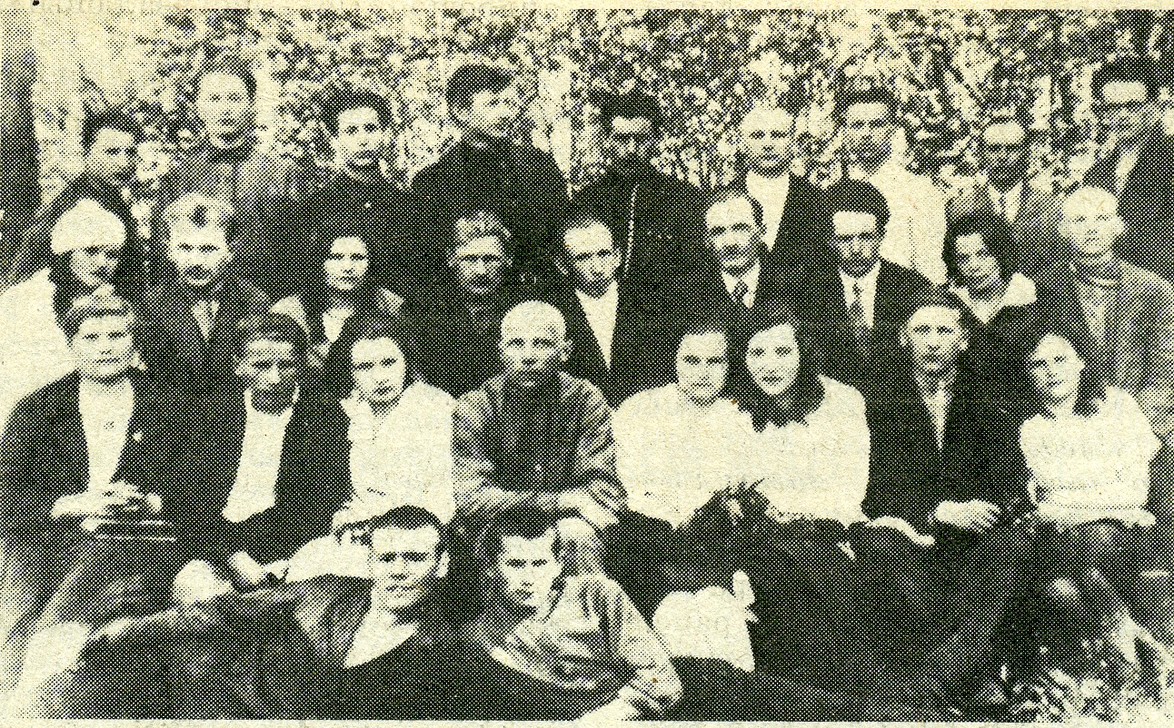 Беларуская (тарашкевіца): Сярод рабфакаўцаў Беларускай сельскагаспадарчай акадэміі ў саўгасе імя 10-дзьдзя БССР. У верхнім шэрагу сядзяць: чацьвёрты зьлева — Уладзімер Хадыка, шосты зьлева — Янка Купала, за ім Алесь Жаўрук, першы справа — Платон Галавач, травень 1933